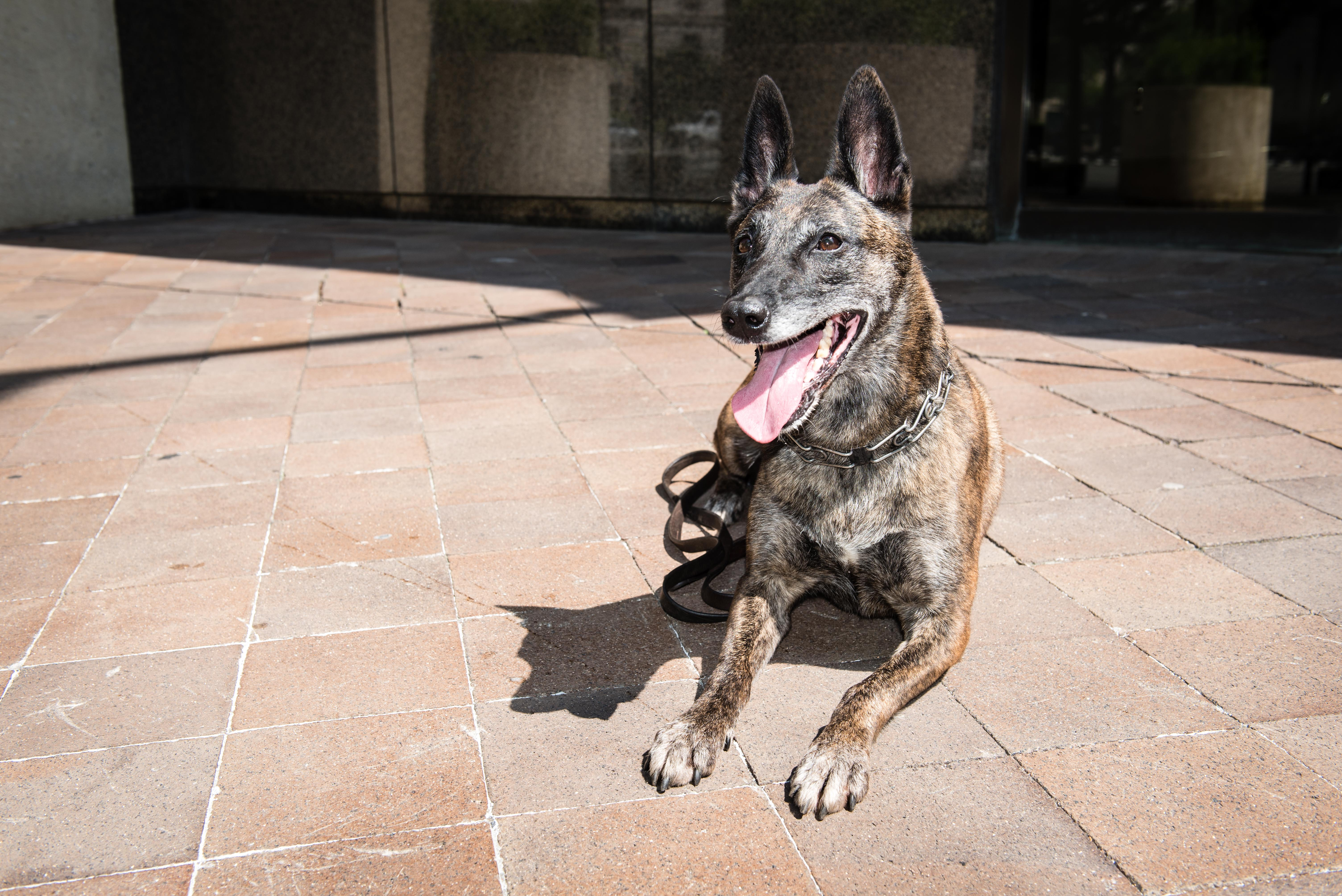 FBI Police K9 Demi